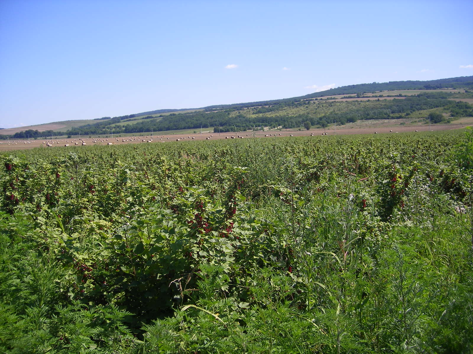 Letkés - ribizlitermesztés a Börzsöny nyugati lejtőin, a falutól északra